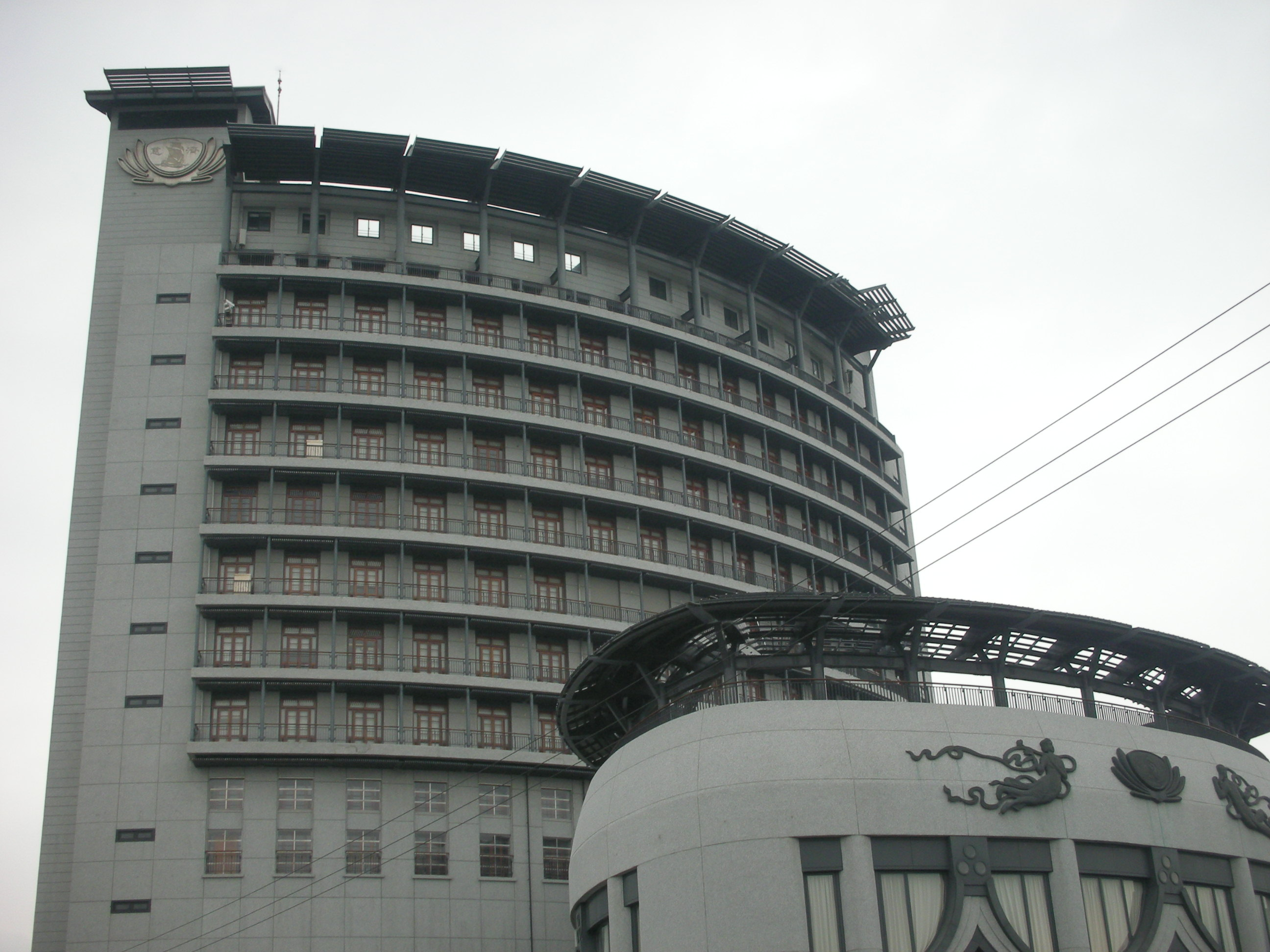 慈濟人文志業中心，地址：臺北市北投區立德路2號。